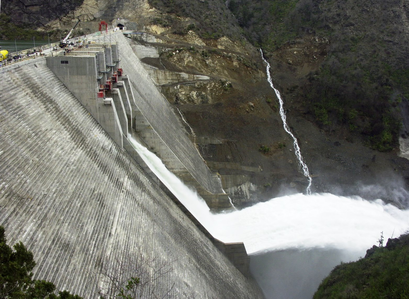 Vertedero con 3 compuertas y salto de esquí